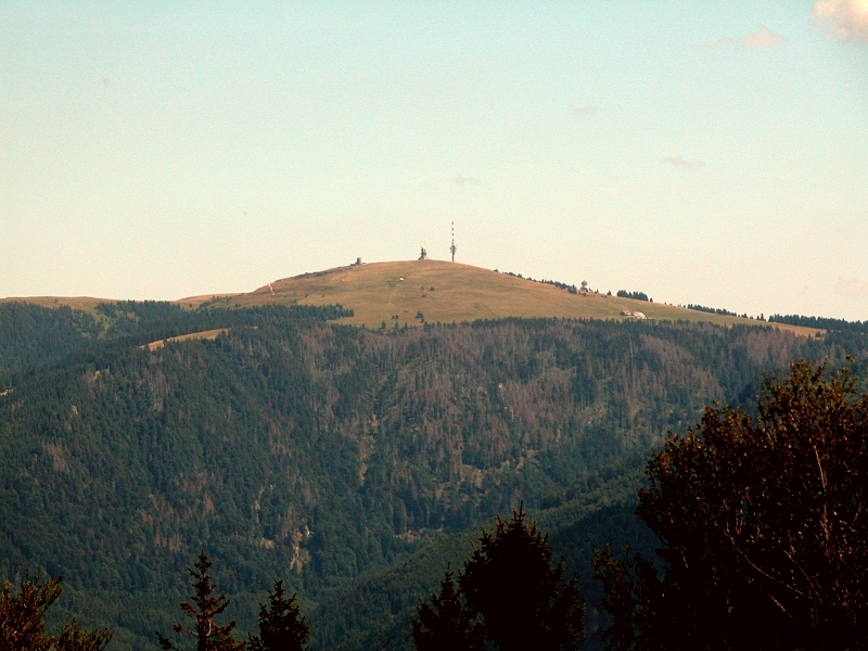 Feldberg, Schwarzwald, Deutschland (Germany)